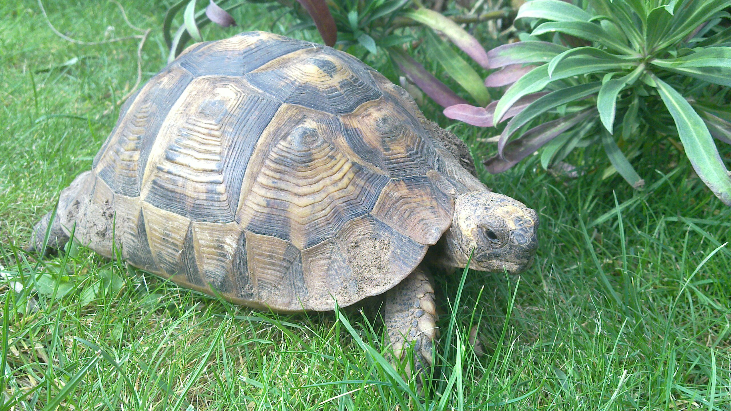 Tortue d'Hermann (testudo hermanni), dans un jardin à Ronchin.